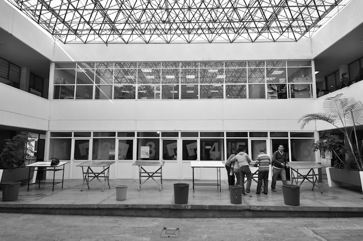 Edicio "P" (Patio Interior) Ciudad Universitaria UMSNH